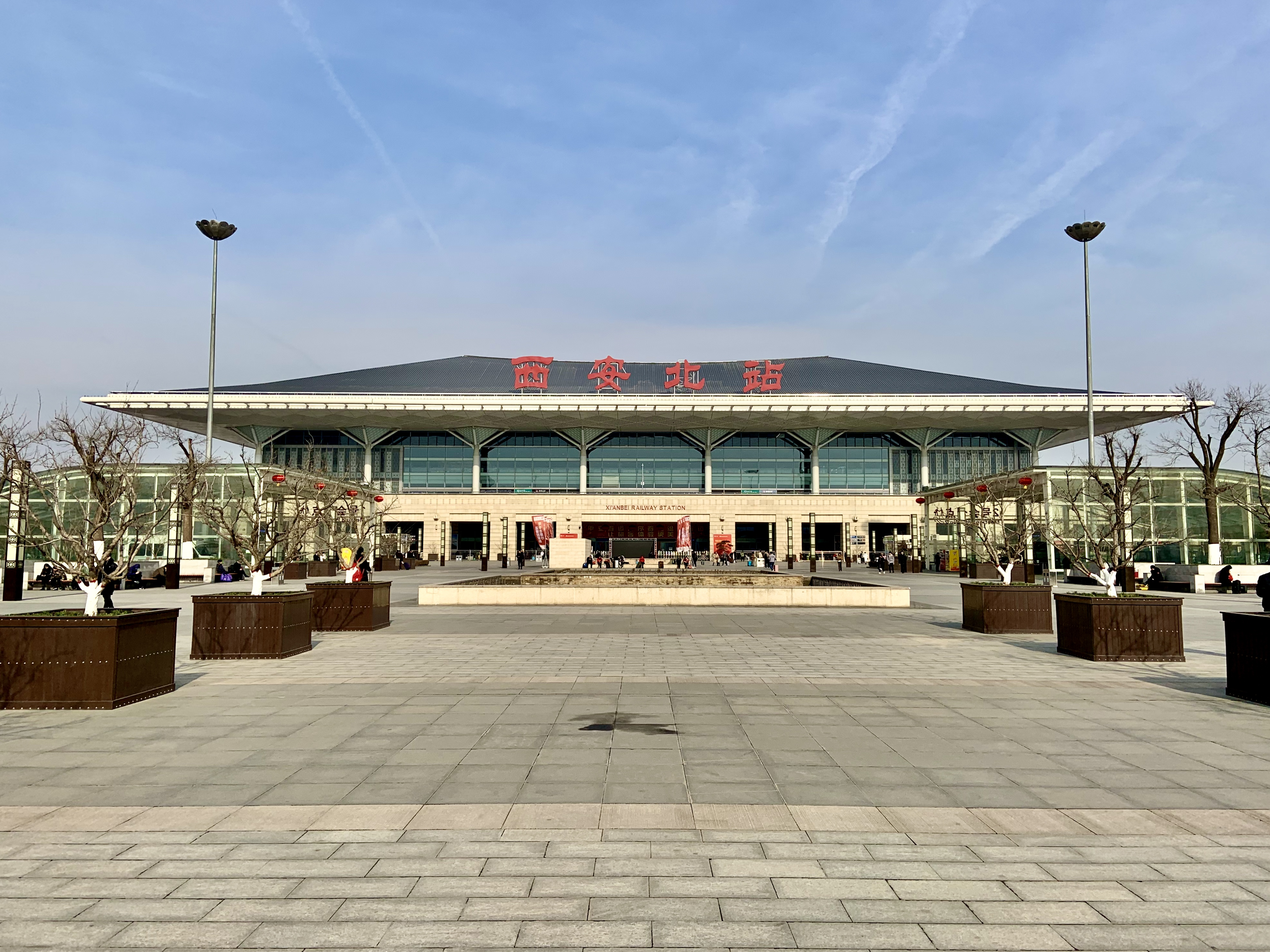 西安北站南广场正面，2020年1月20日